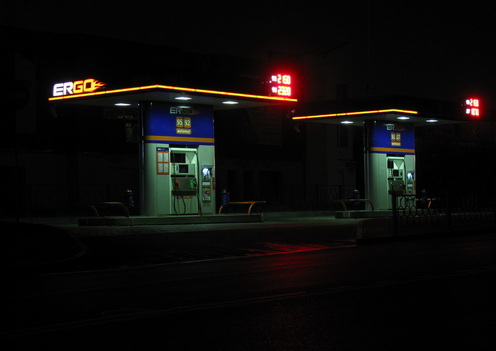 Заправка ERGO на улице Готвальда в Екатеринбурге